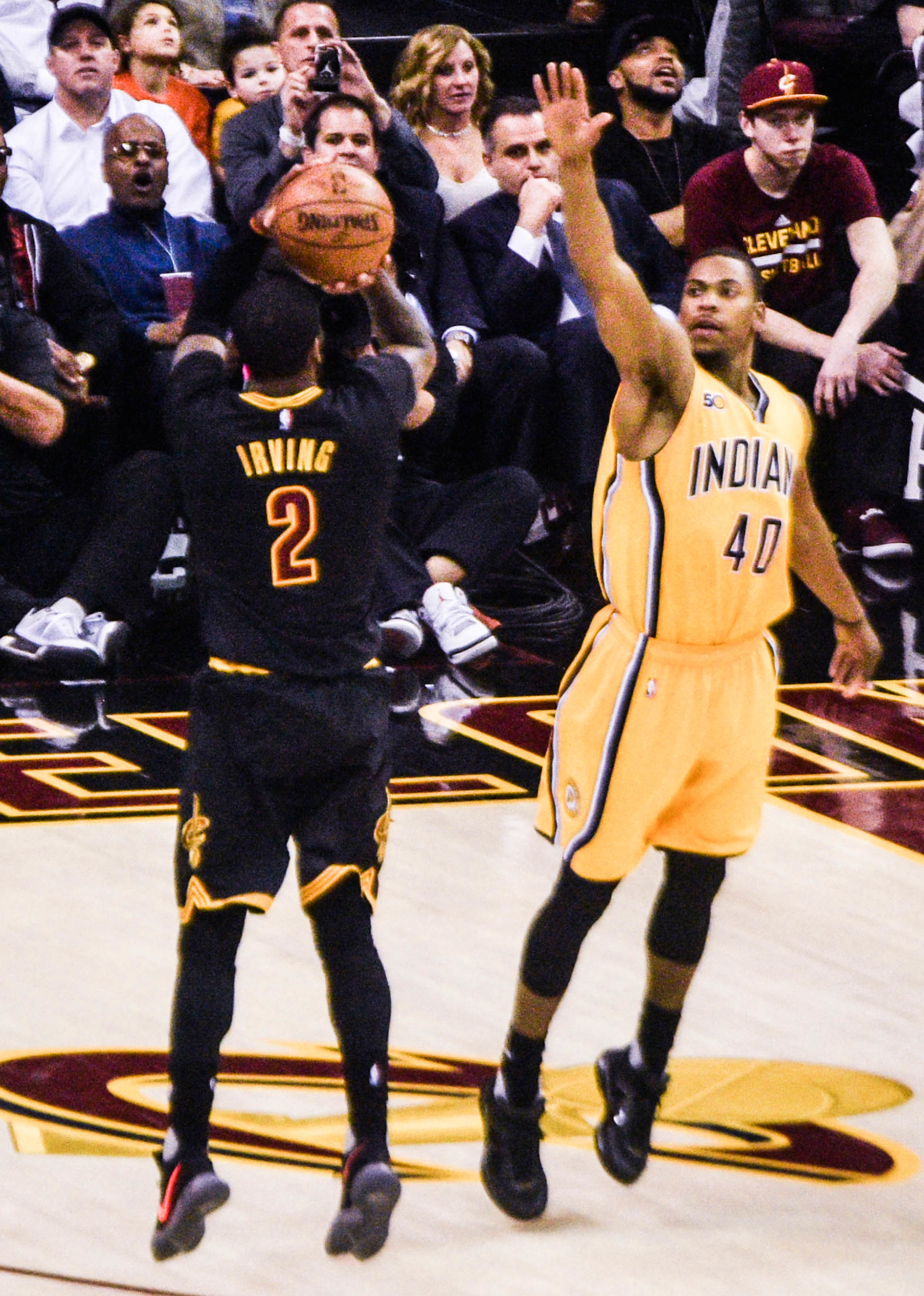 Kyrie Irving